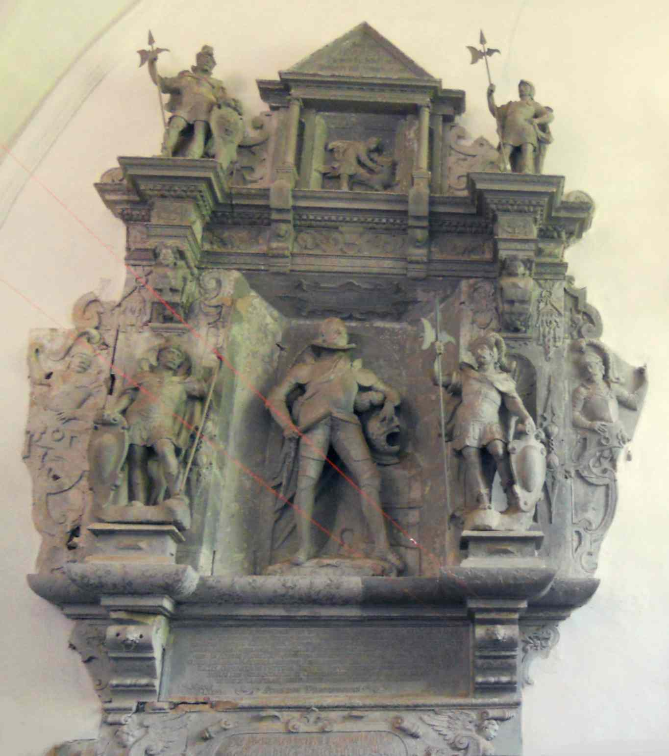 Vilmnitz Wandrelief